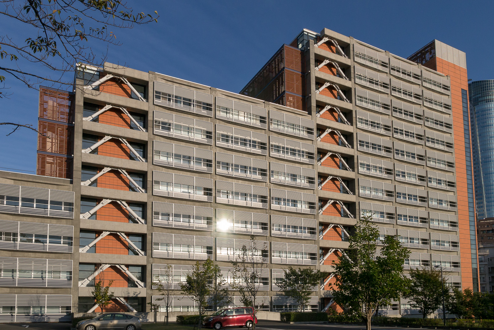 政策研究大学院大学、東京都港区六本木7-22-1。